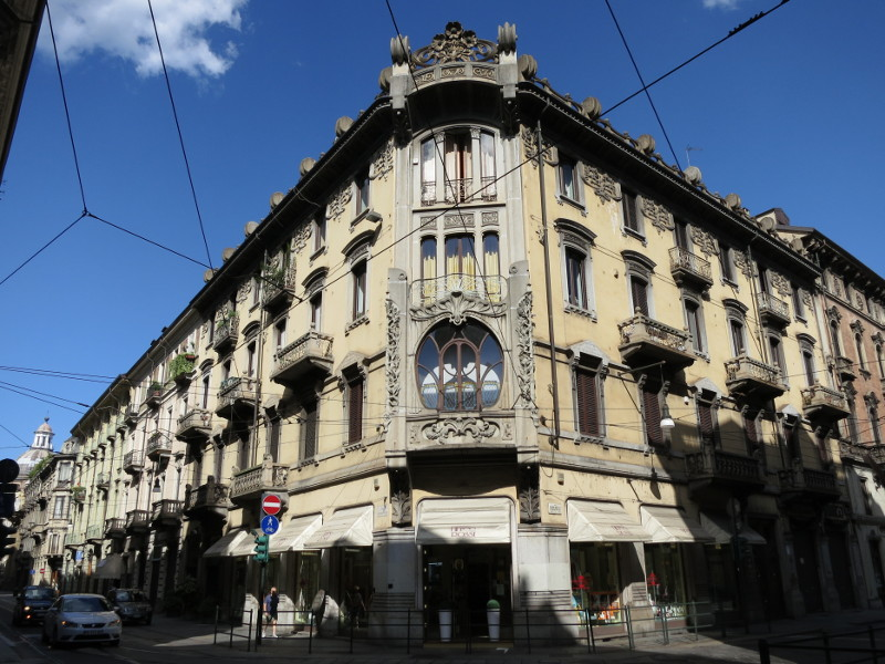 Turin, à l'angle des rues Saint François d'Assise et Antonio Bertola